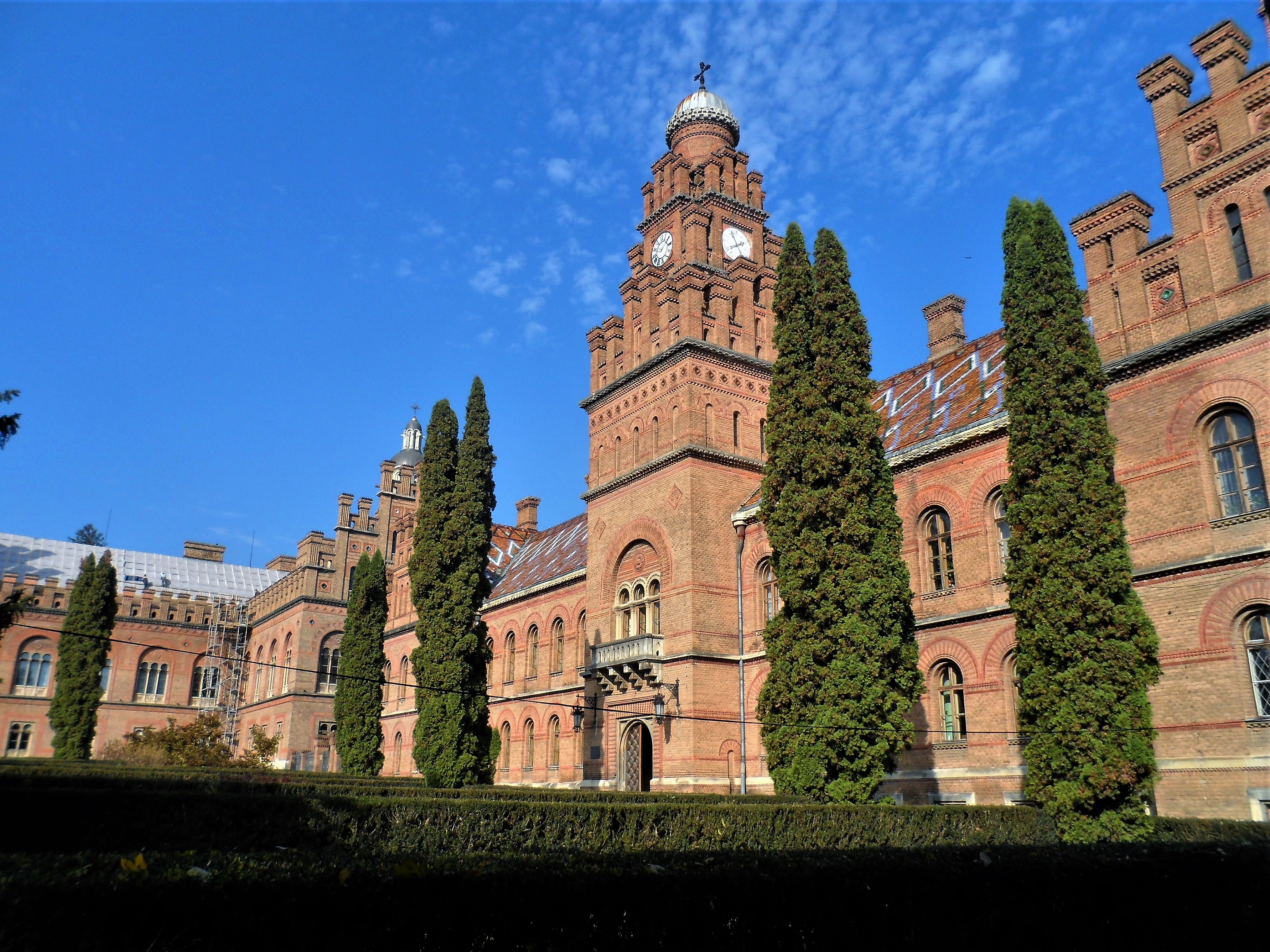 Будинок для приїжджих, Чернівці, вул. М. Коцюбинського, 2